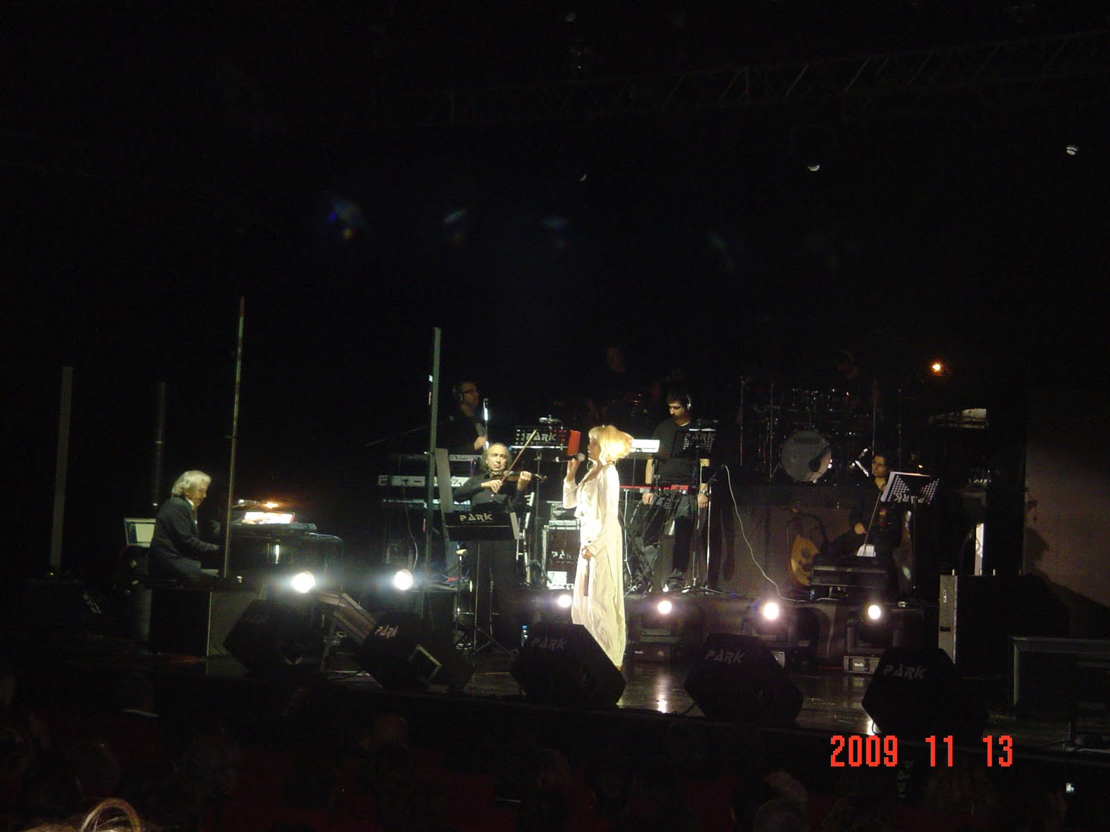 Ajda Pekkan Anadolu Gösteri Merkezi konseri,.